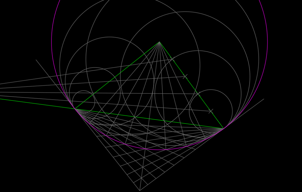 Stabilito di avere una conica Δ, ed un punto P esterno ad essa. Quando dal punto P si tracciano le tangenti a Δ nei punti punti T, T', si dice che P e' il polo di Δ. Invece la retta p che unisce tali punti T, T', si dice polare di P rispetto a Δ. Se volgiamo interpretare tale fatto nello spazio, il Polo P, e' la prima traccia della retta comune ai due piani, α e β, tangenti il cono k e passanti, rispettivamente, per i punti T, T'. Invece la polare, e' la prima traccia del piano passante per i tre punti V, T, T'.